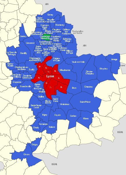 Communes du Grand Lyon, en vert Couzon-au-Mont-d'Or